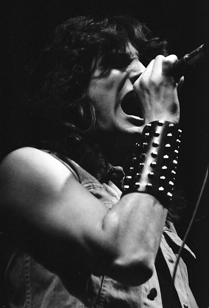 Jose Antonio Manzano en concierto con su grupo Tigres (Naus del Clot, Barcelona. Enero, 1983.